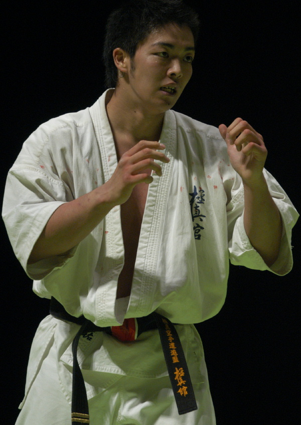 藤井脩祐の空手